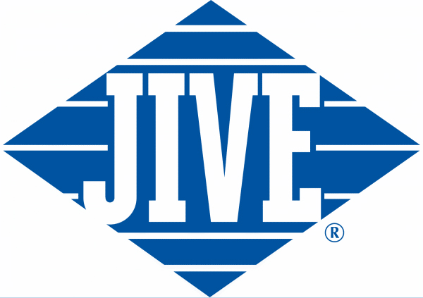 Logo von Jive Records